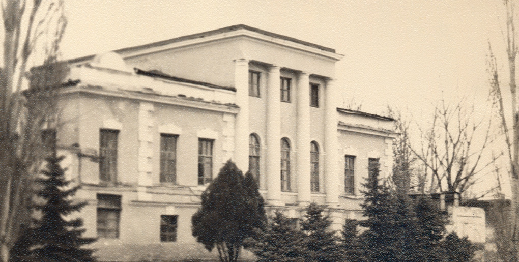 Новочеркасск (до 07.11.1917). Соседнее с духовным училищем здание - уездное училище после Октябрьской революции.